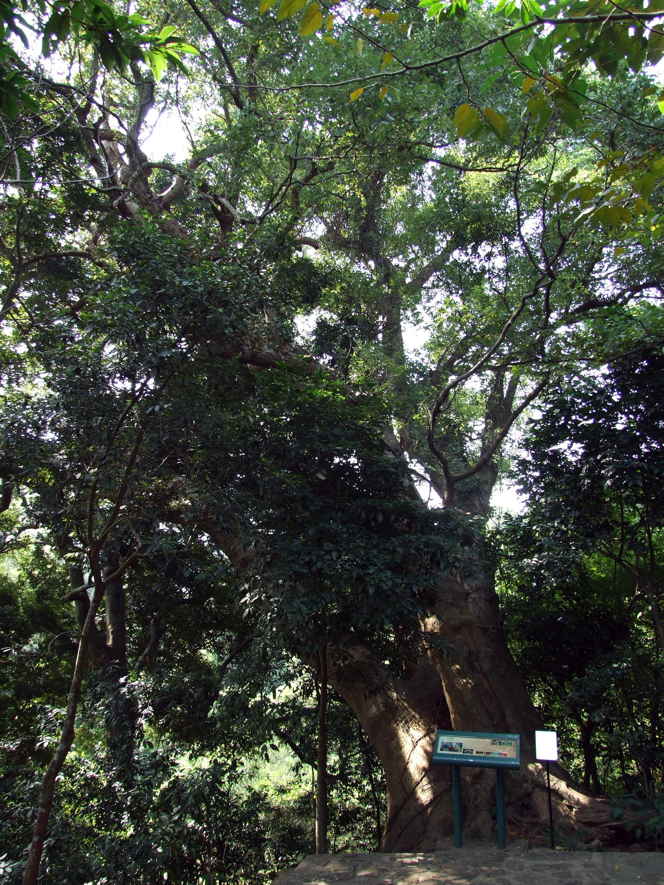 中文（香港）: 五指樟